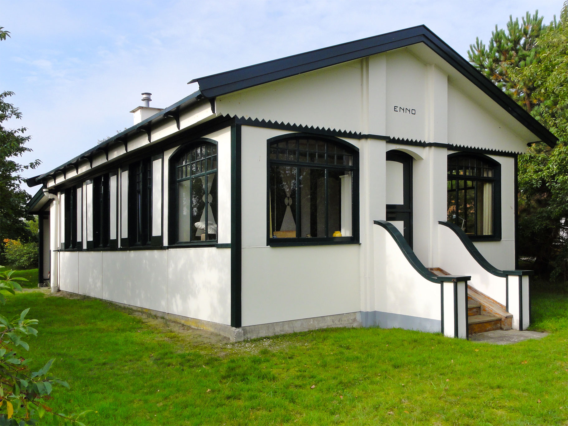 Enno Badweg 43 in Schiermonnikoog